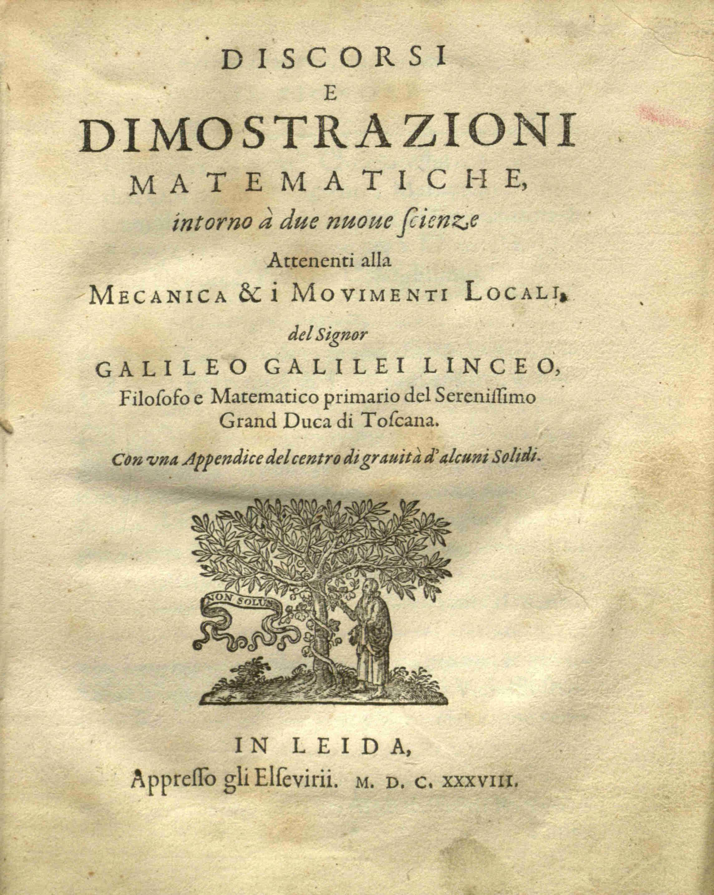 Galileo Galilei: Discorsi e Dimostrazioni Matematiche Intorno a Due Nuove Scienze, 1638